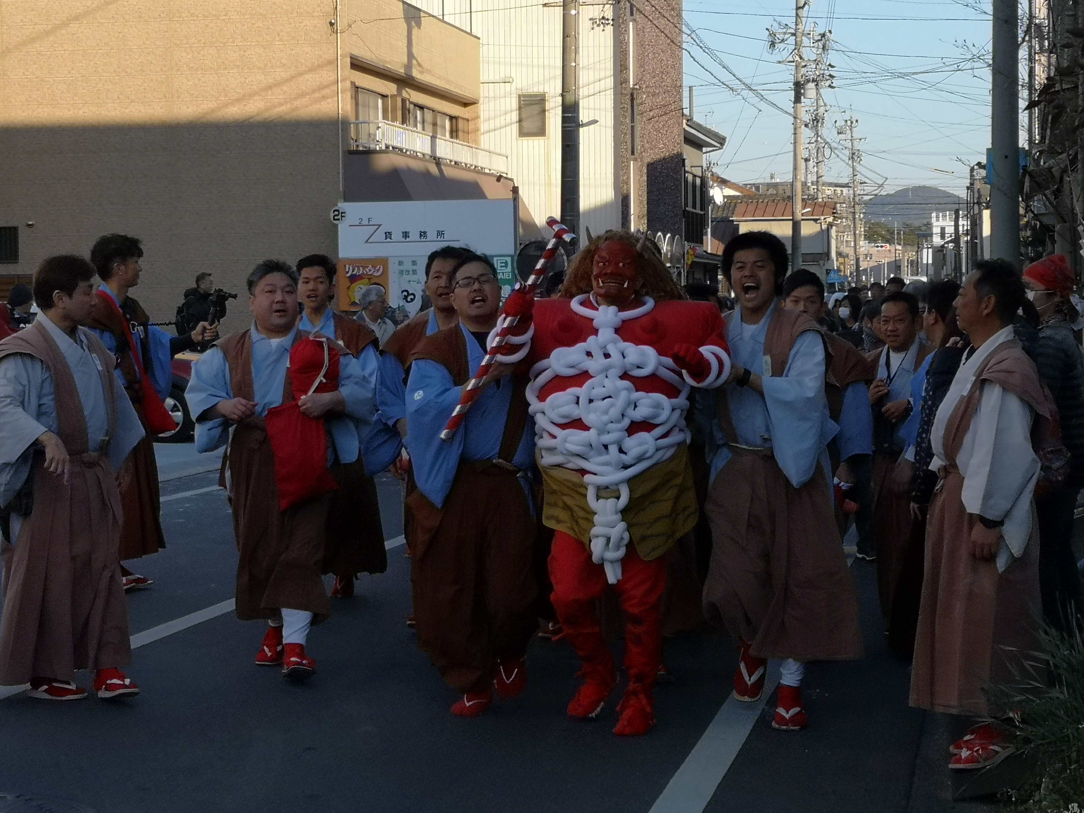 愛知県豊橋市の安久美神戸神明社の例祭「鬼祭」における赤鬼の門寄り